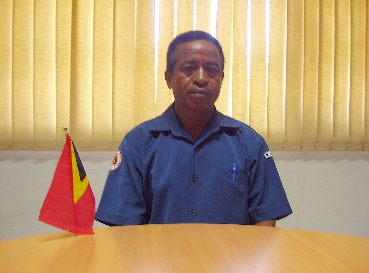 Martinho Pires, Administrator des Subdistrikts Fatumean